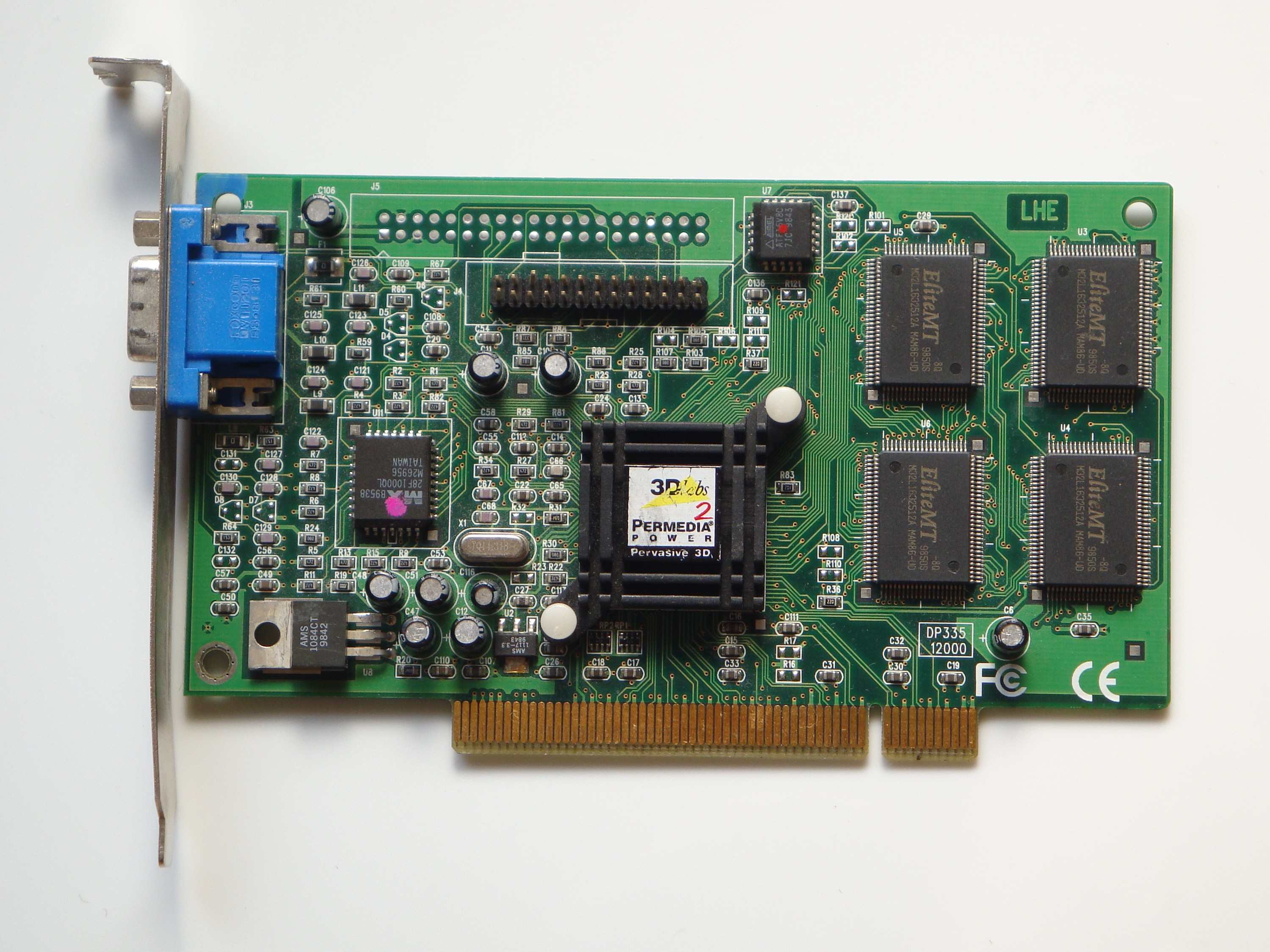 3DLabs Oxygen ACX PCI - Permedia2 Card